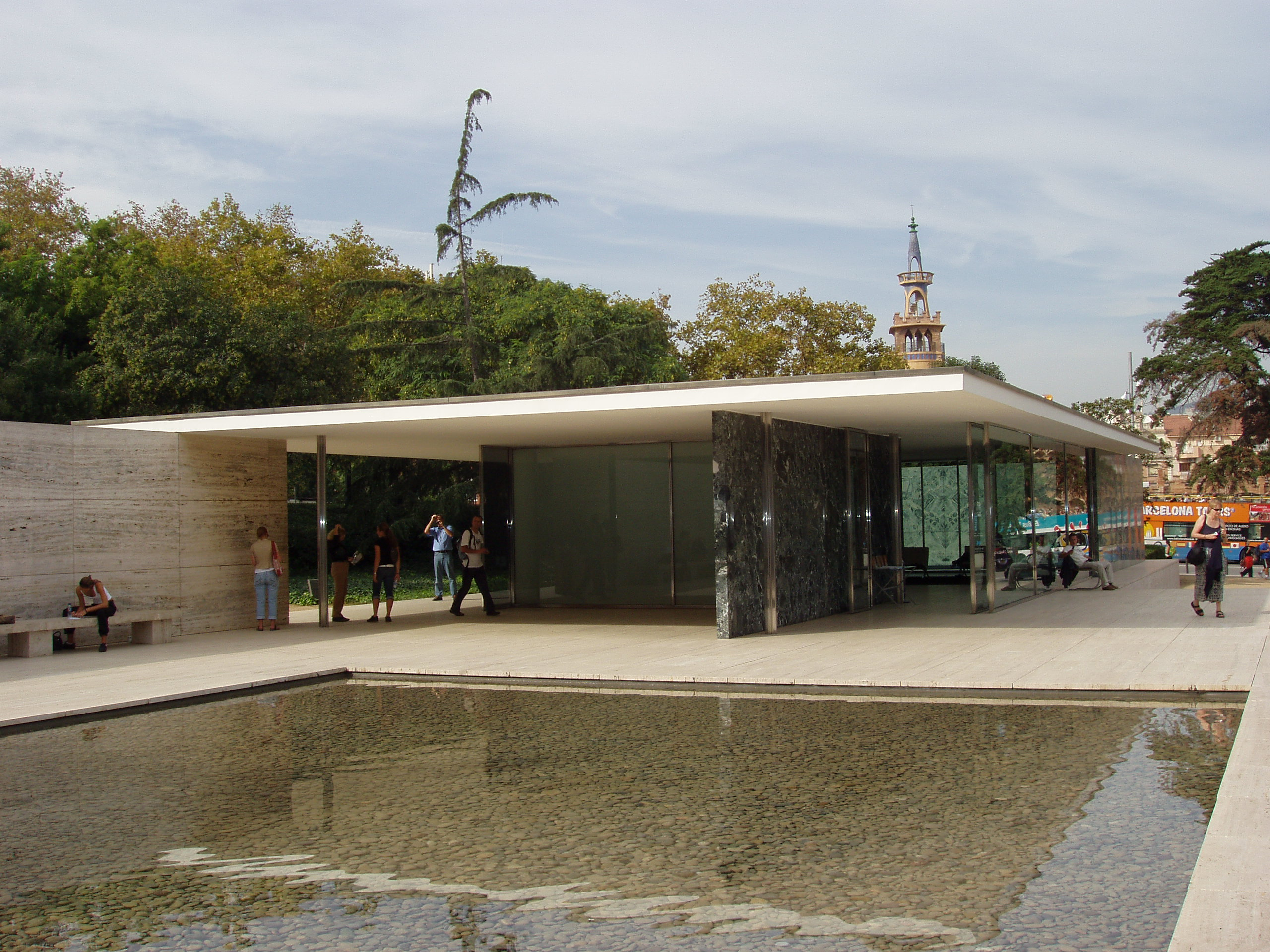 Pabellón de Alemania en la Exposición Universal de Barcelona 1929 (reconstruido). Arquitecto Ludwig Mies van der Rohe.